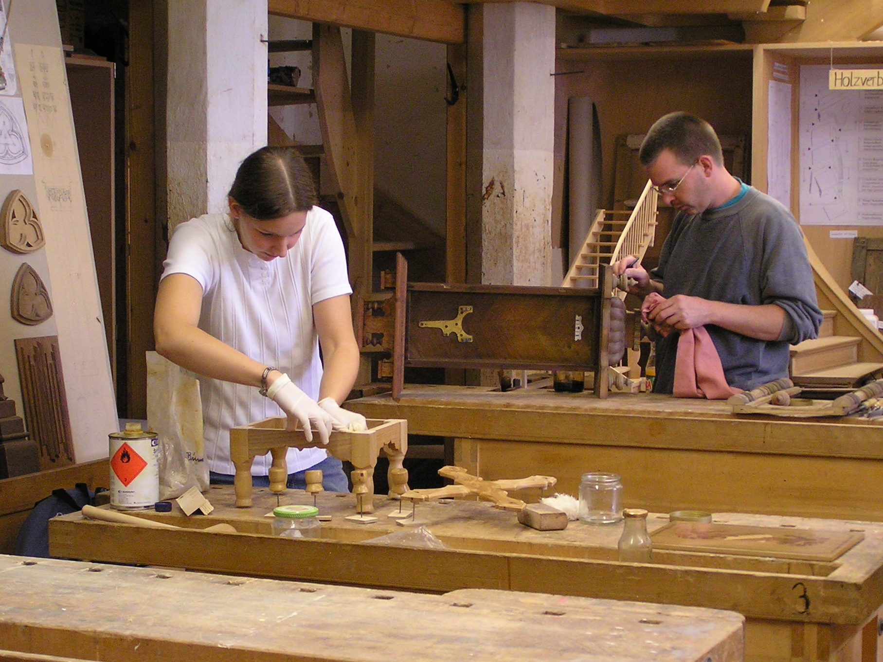 Restauratoren im Handwerk im Fachbereich Holz des Fortbildungszentrums für handwerkliche Denkmalpflege der Akademie des Handwerks auf Schloss Raesfeld